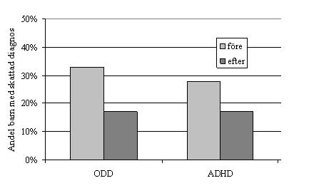 (Diagram som visar effekten i beteendemått efter en KOMET-behandling)